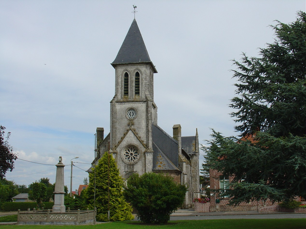 Église de Quercamps